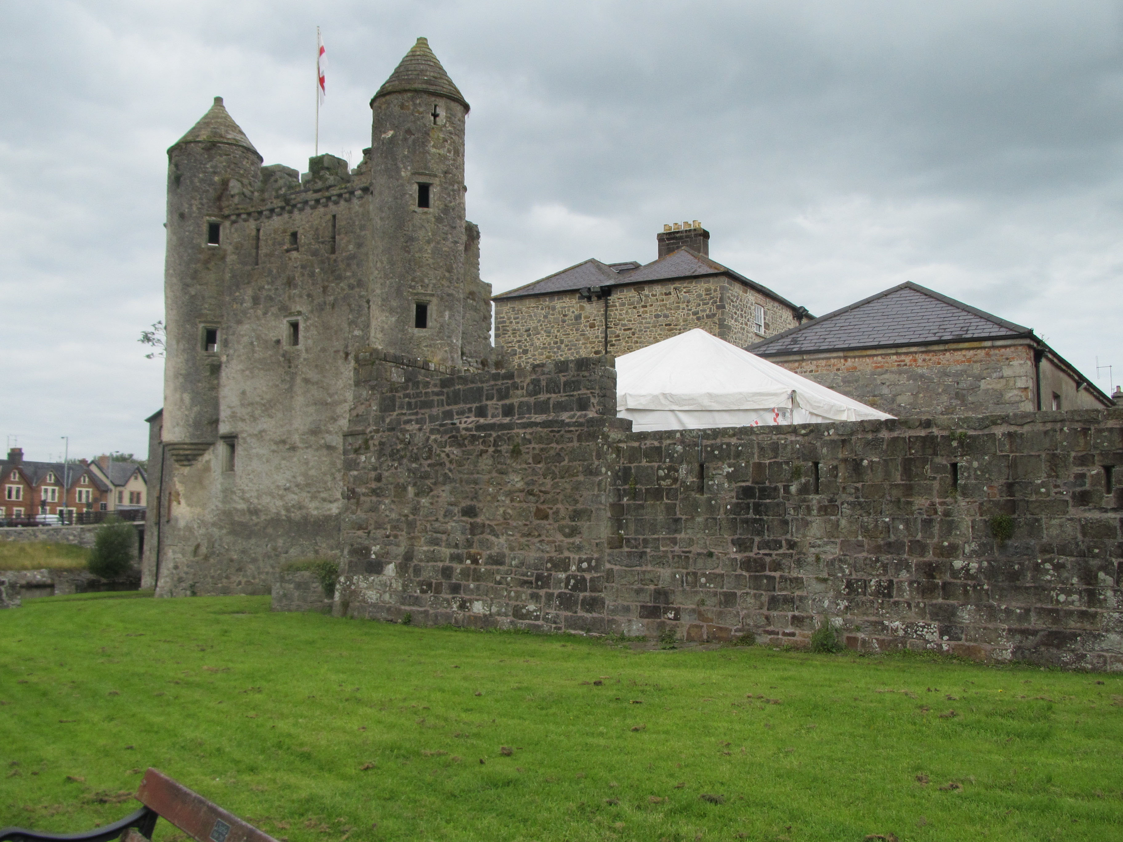 Enniskillen Castle by Paride